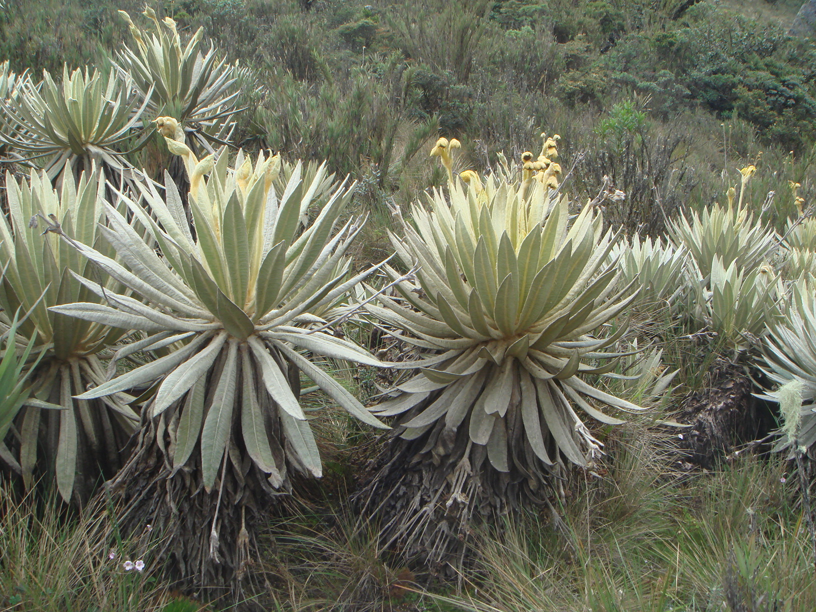 Frailejones (Espeletia killipii), Páramo de Guasca, Cundinamarca, Colombia.